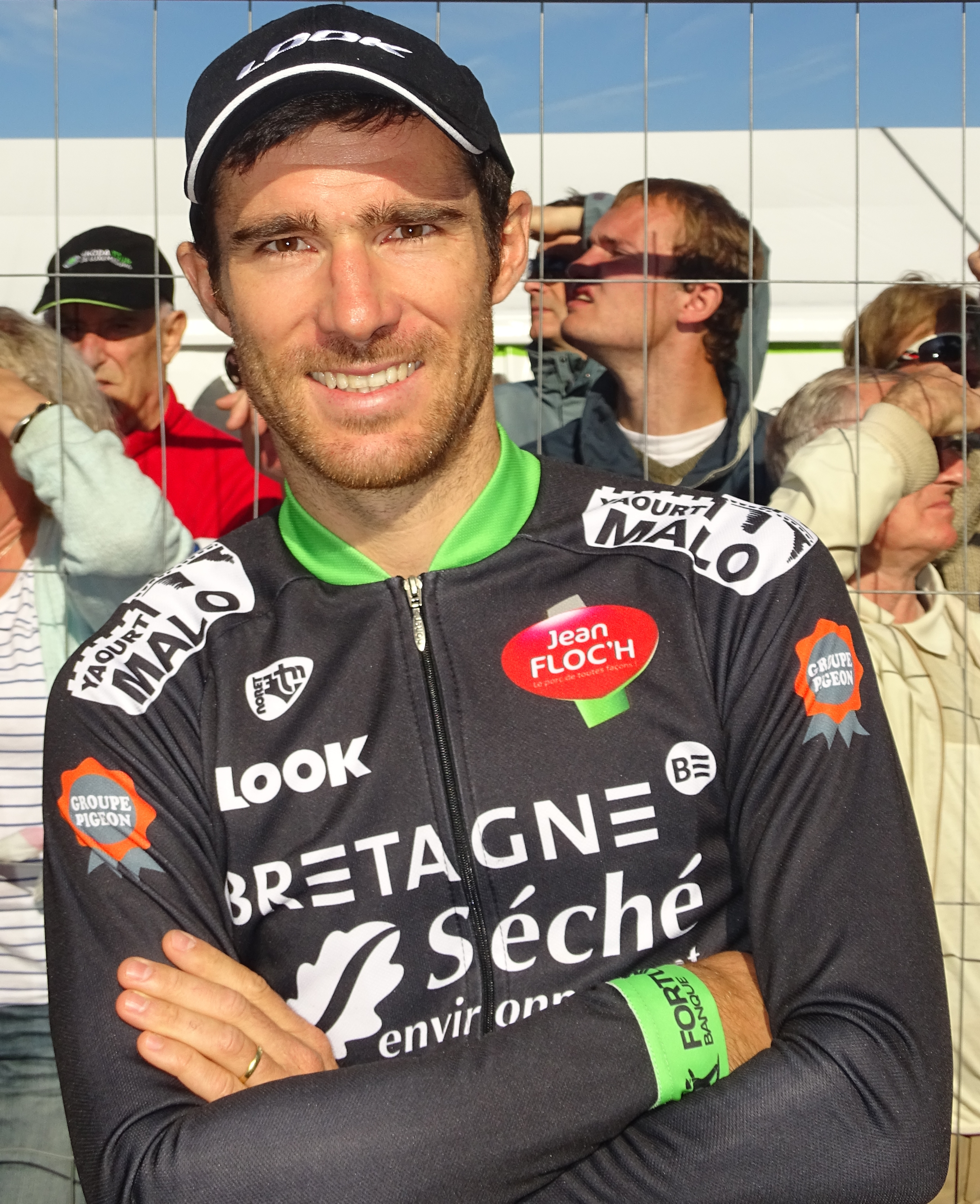 Reportage réalisé le dimanche 20 septembre à l'occasion du départ et de l'arrivée du Grand Prix d'Isbergues 2015 à Isbergues, Nord-Pas-de-Calais, France.